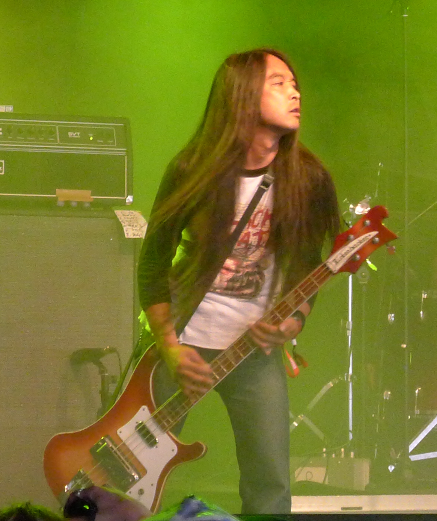 Church of Misery live am Tuska Open Air 2011